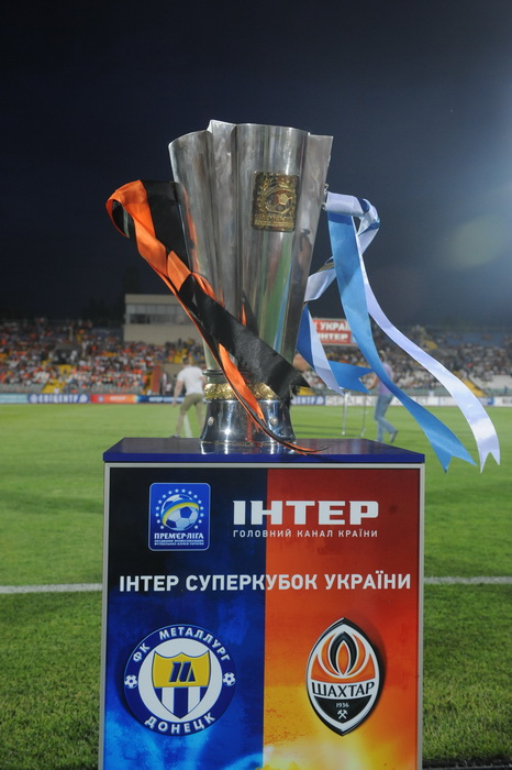 Суперкубок Украины по футболу 2012